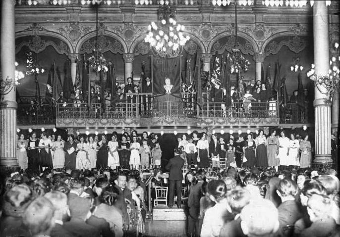 Commémoration en l'honneur de Jaurès, Salle Wagram : photographie de presse